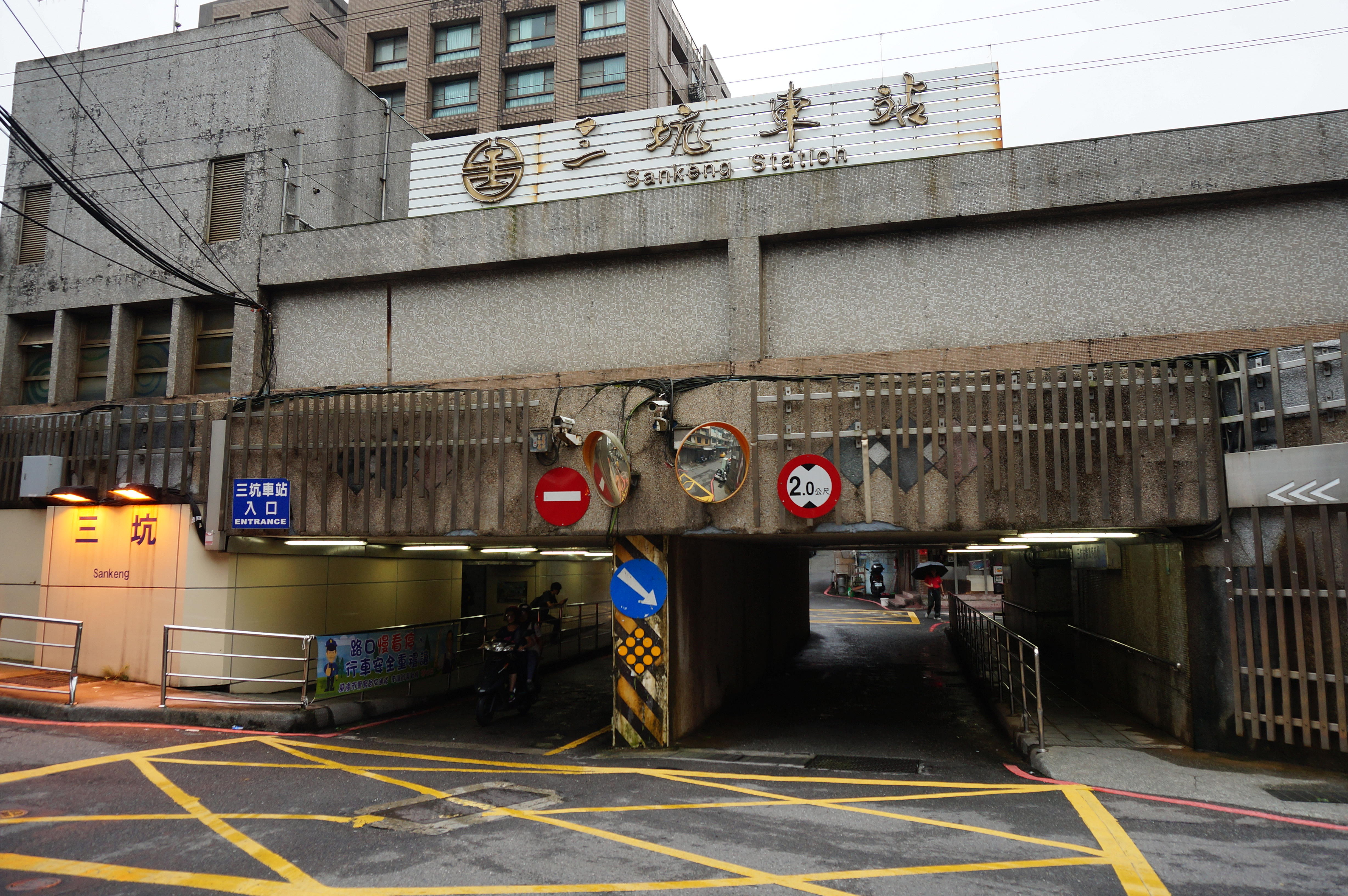 臺灣鐵路管理局三坑車站入口。